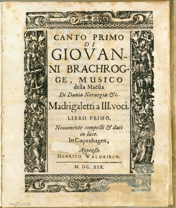 Hans Brachrogge: Madrigaletti a III voci, 1619